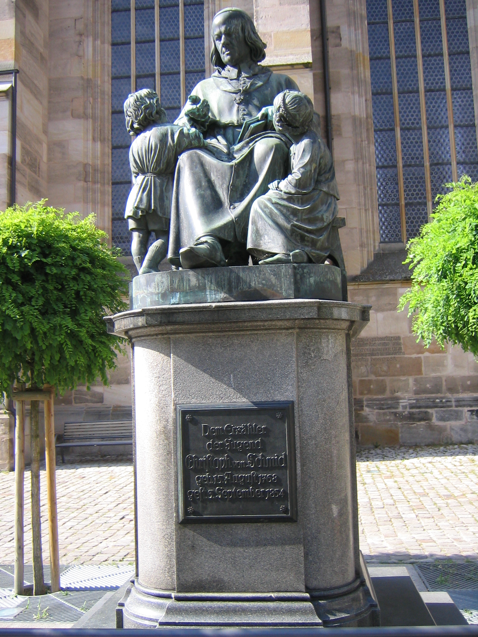 Christoph von Schmid: Denkmal vor dem Dinkelsbühler Münster St. Georg.